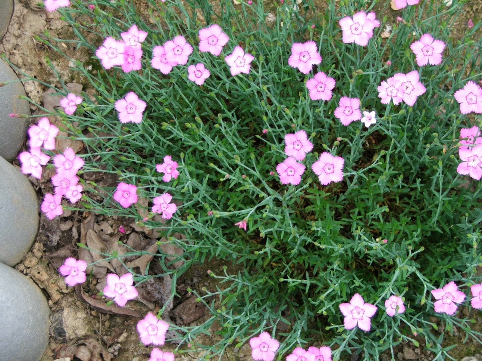 Dianthus gratianopolitanus cultyvar (pl. goździk siny)